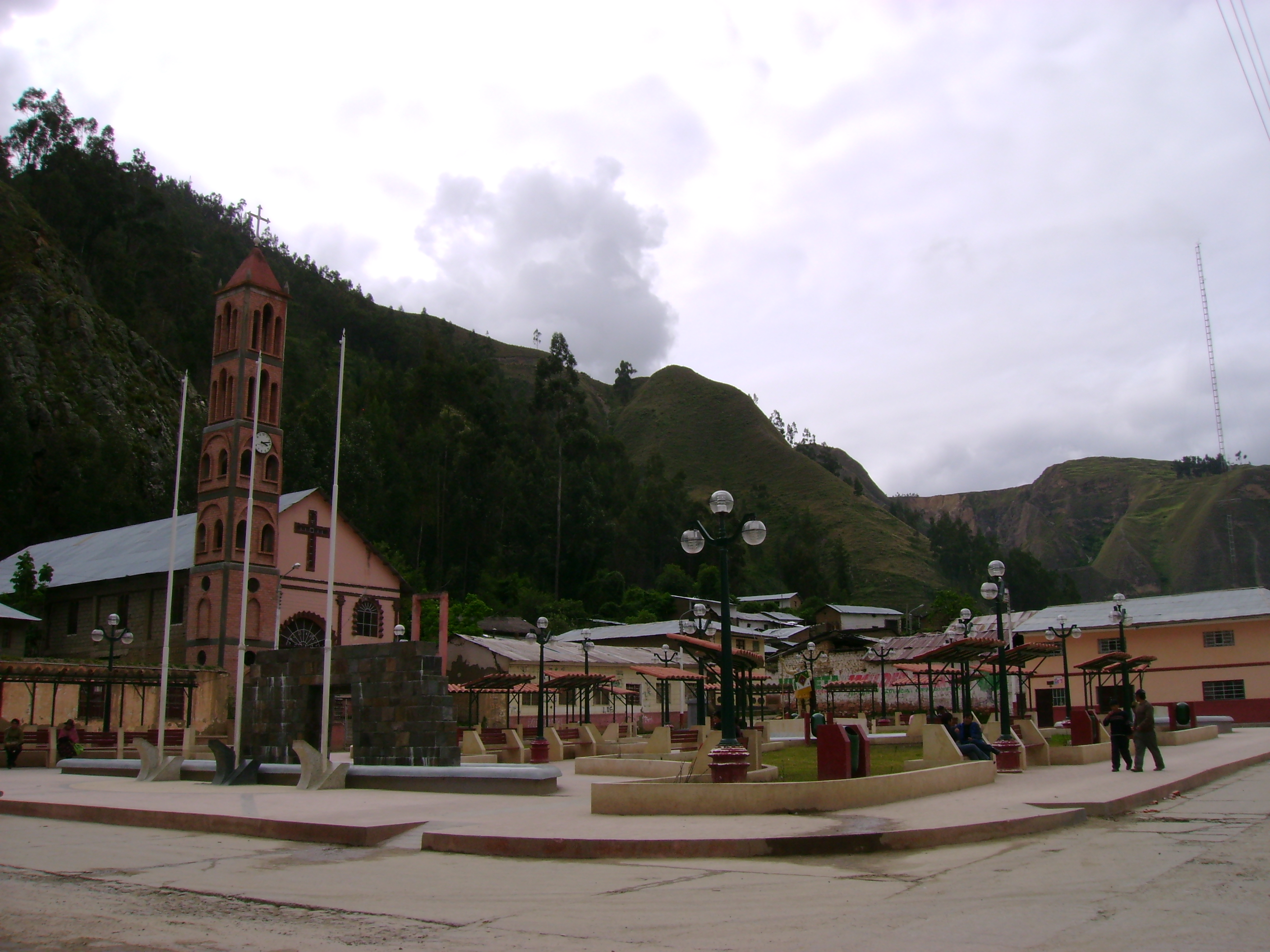 La nueva Plaza de Armas.